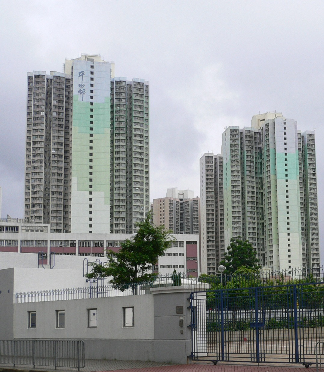 平田邨